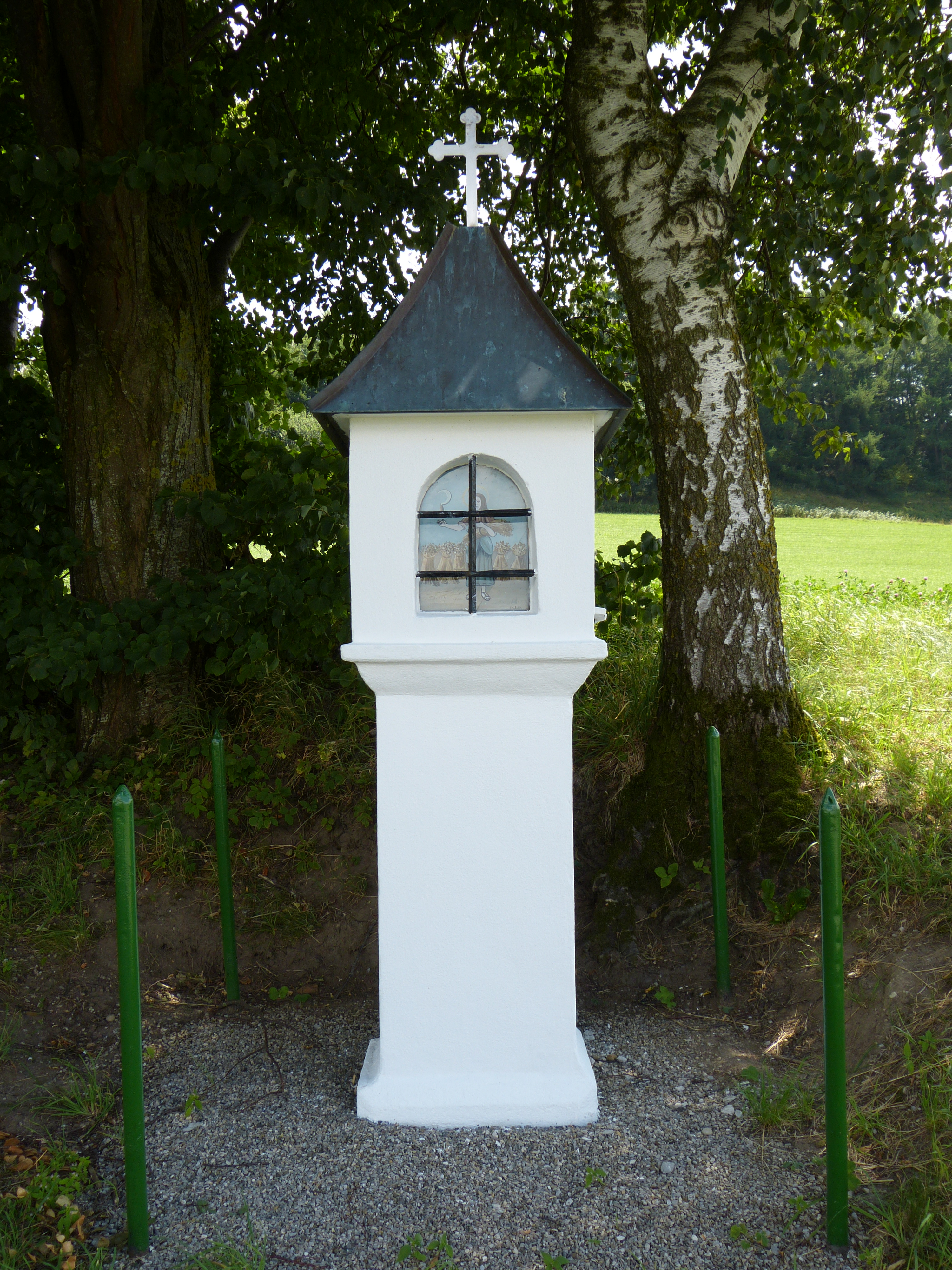 Bildstock bei Simonsberg, Landkreis Unterallgäu, Bayern